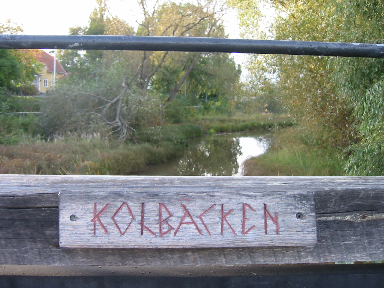 Kolbäcken i Kolbäck. Utsikt från gångbro med skylt.